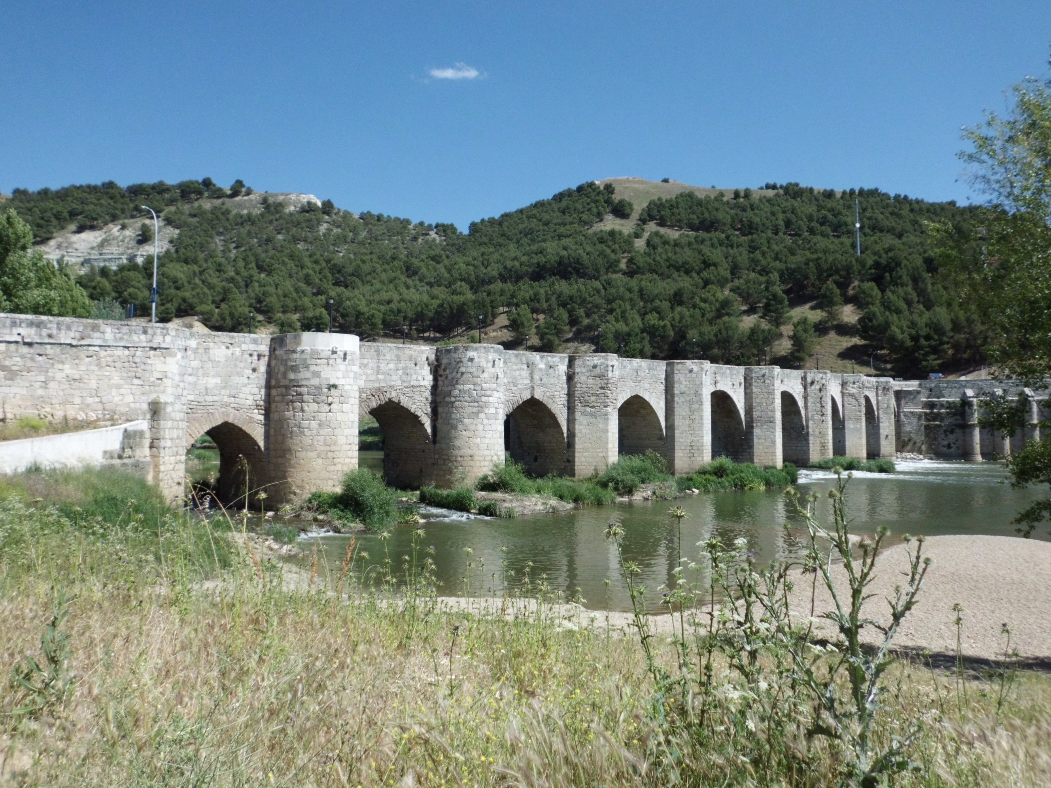 Puente de Cabezón de Pisuerga en el año 2014. En junio del 2015 se derrumbó el muro de contención.